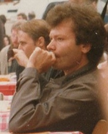 Porträt Wolfgang Pages,ehemals Hamburger Bürgerschaftsabgeordneter